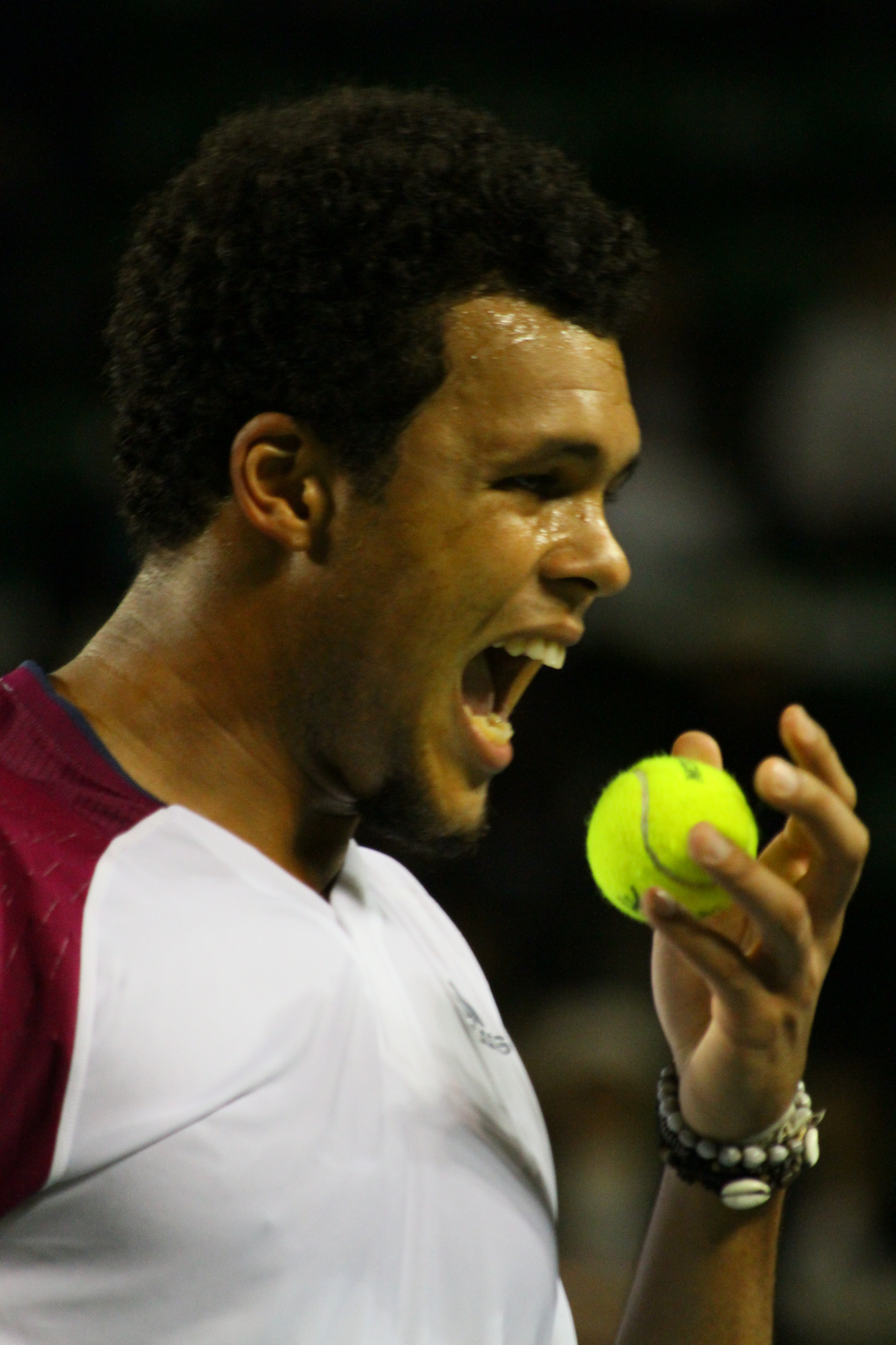 Jo-Wilfried Tsonga, en el torneo ATP de Tokio 2010.